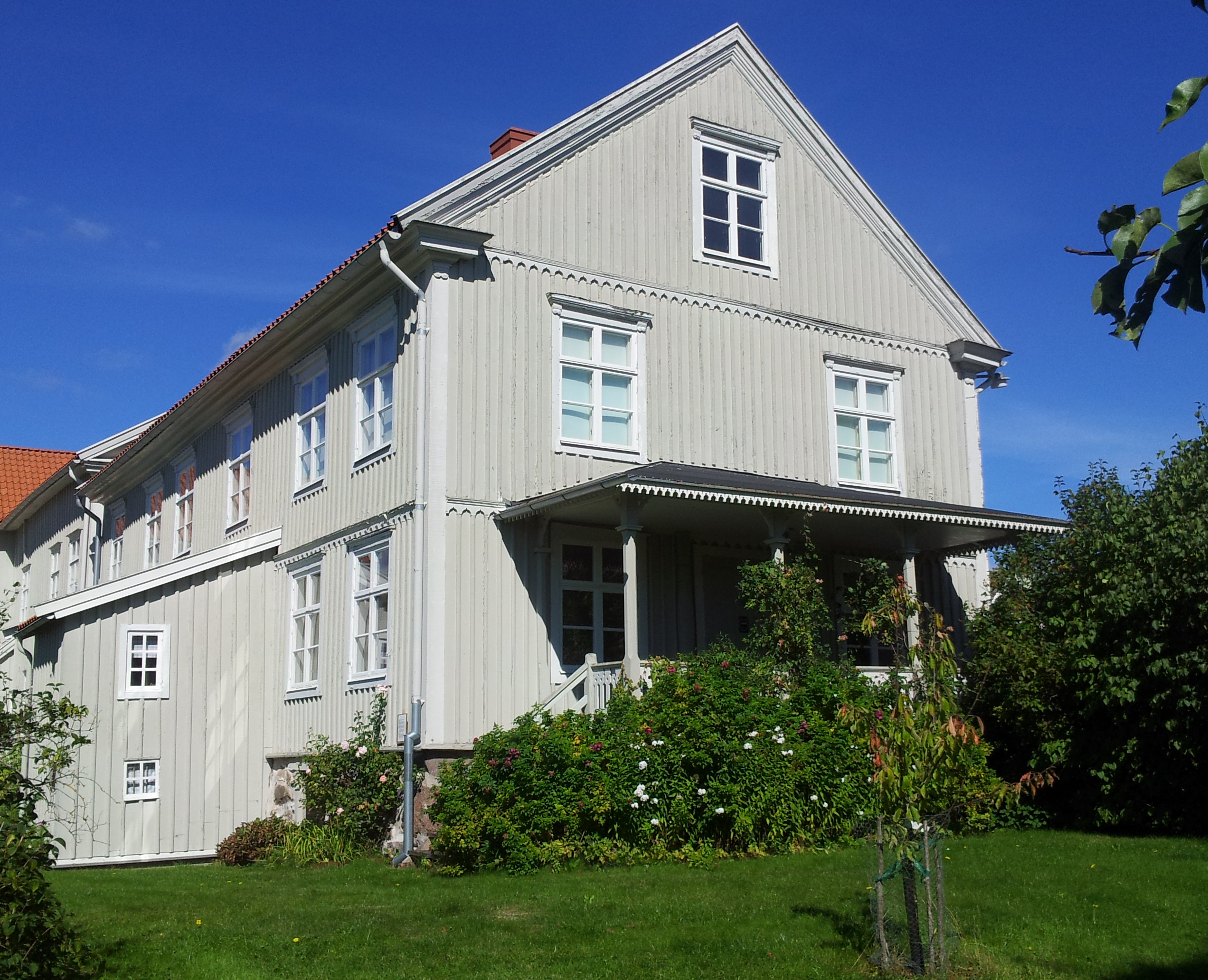 Harbergska gården (Strömsrum 2:7) Baksidan.